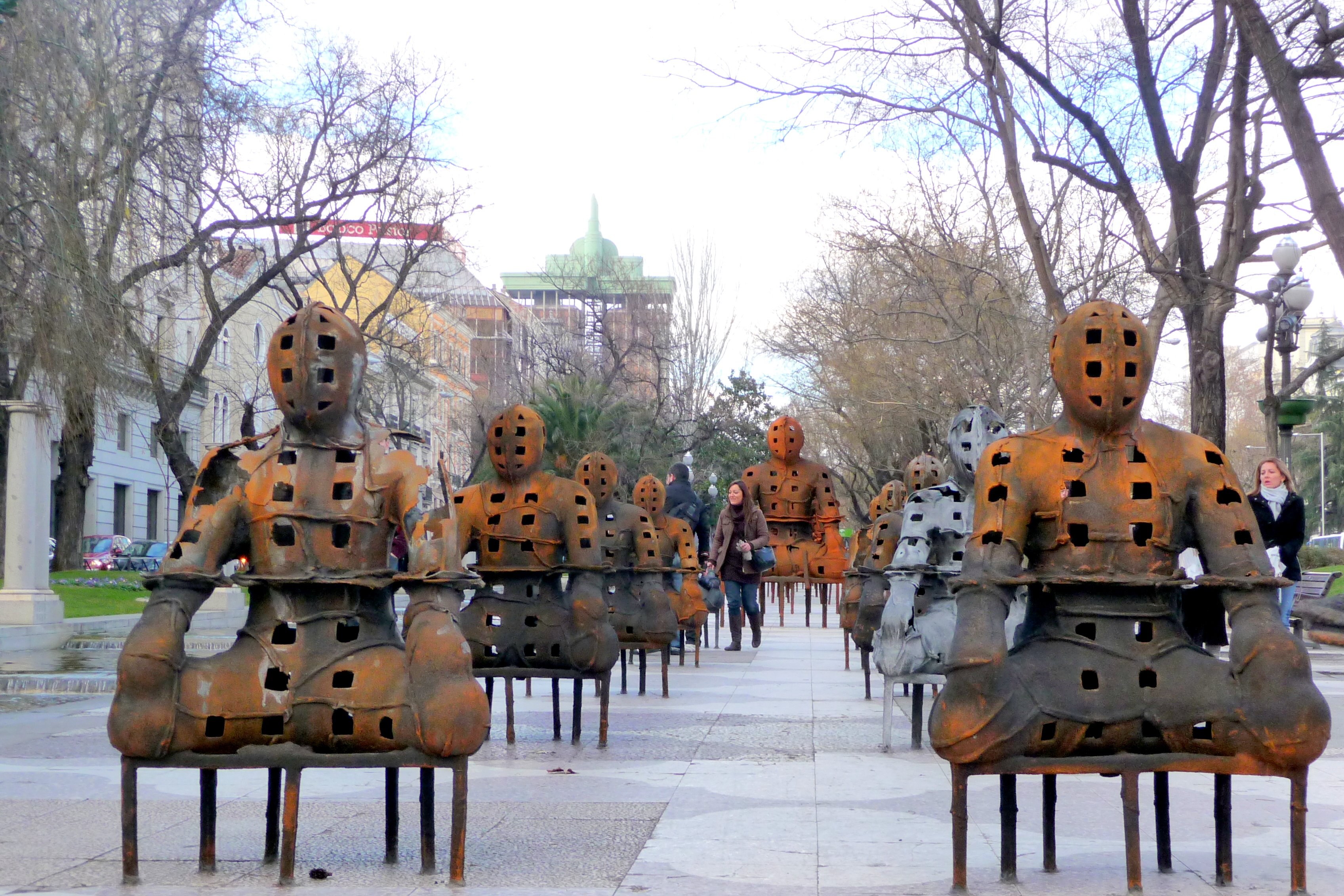 Exposición 'Guerreros' de Xavier Mascaró en Madrid